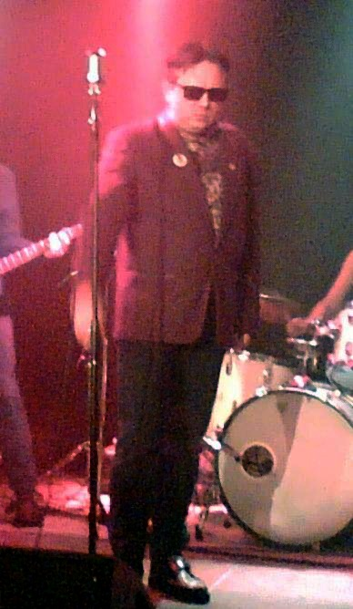 Tõnu Trubetsky performing with Vennaskond in Tikkurila, Finland in 2006.